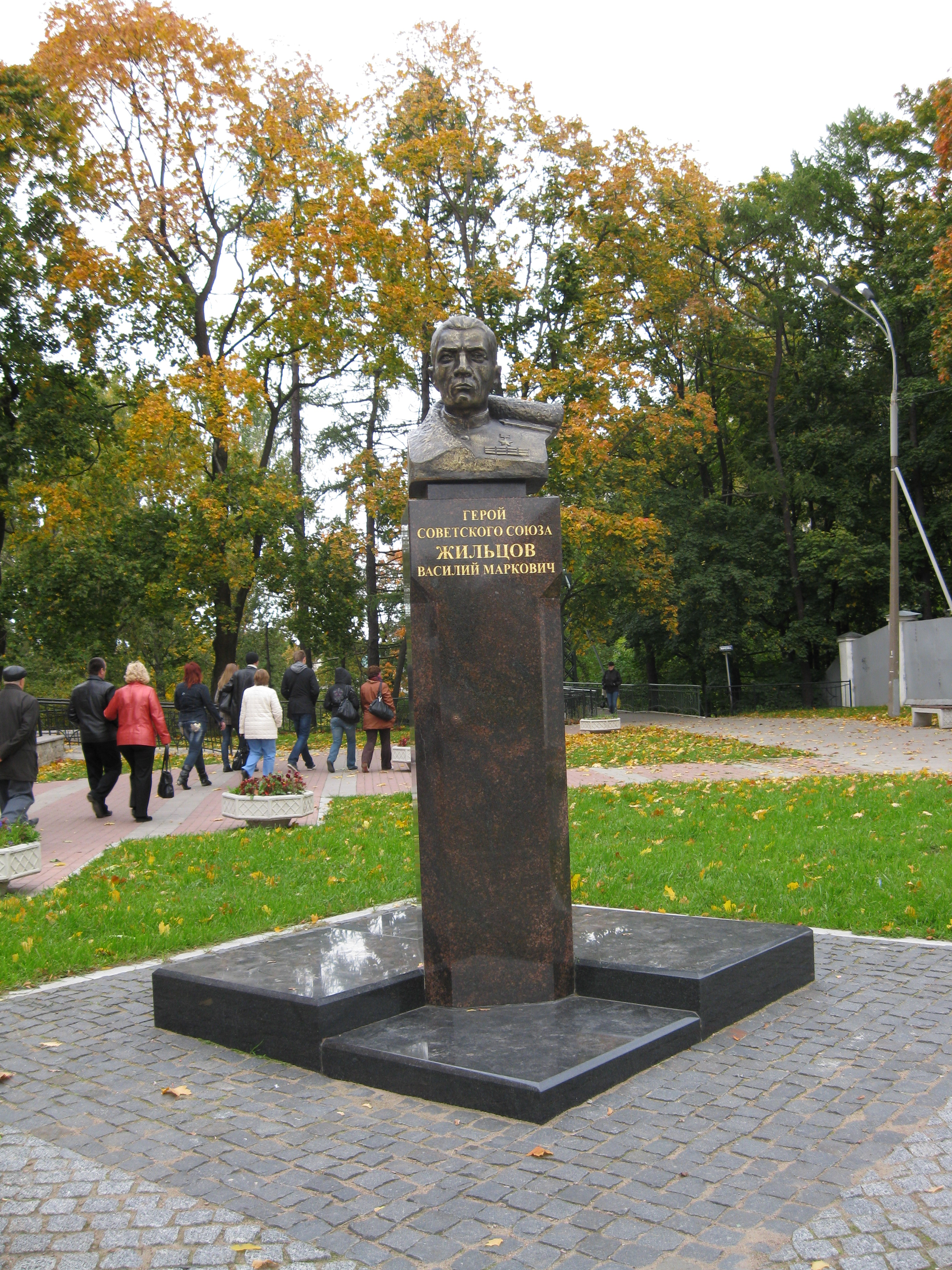 Памятник Герою Советского Союза Жилцову Василию Марковичу в Кронштадте. Открыт 13 сентября 2008 года.